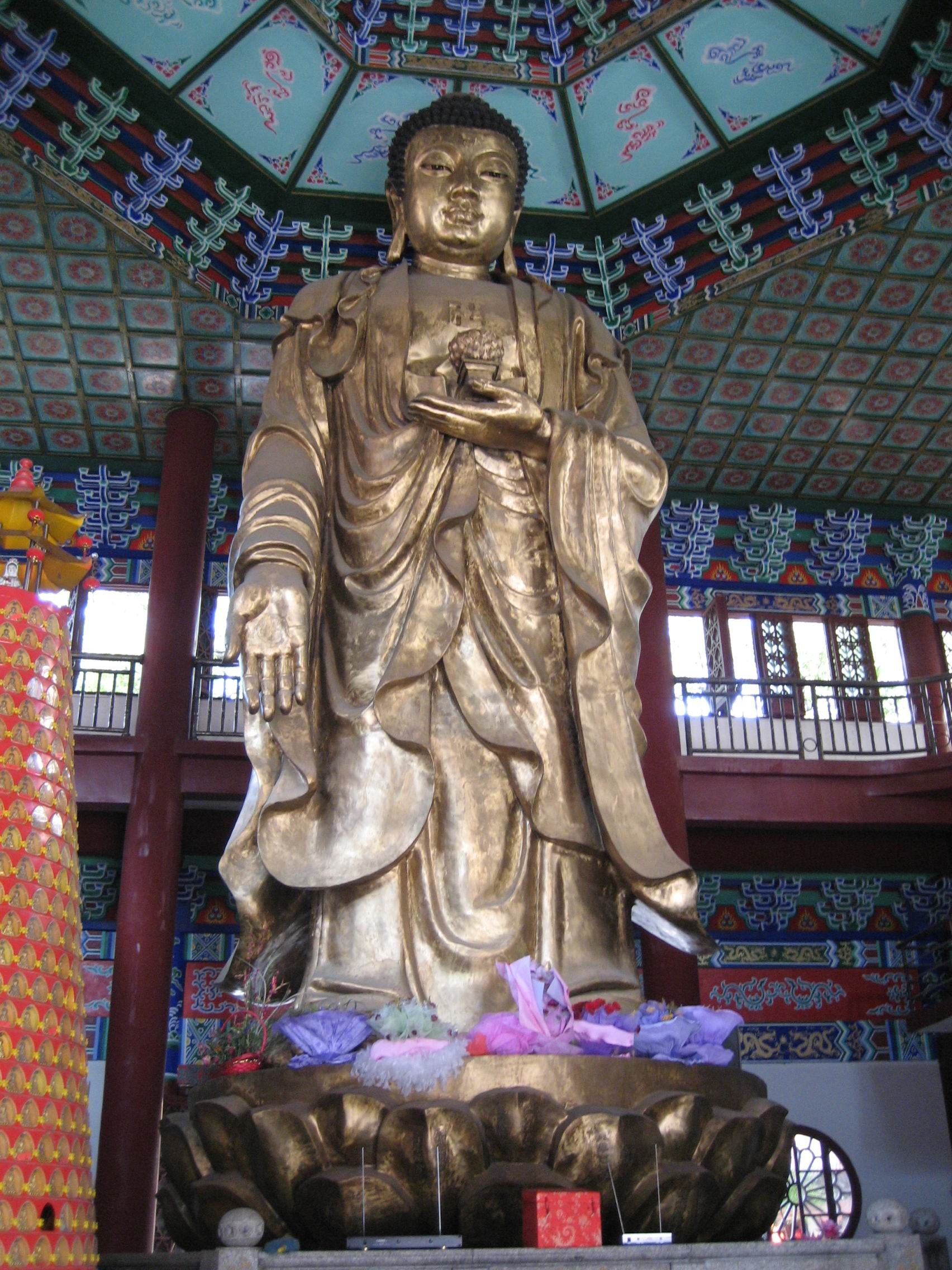 重铸的佑民寺接引铜佛